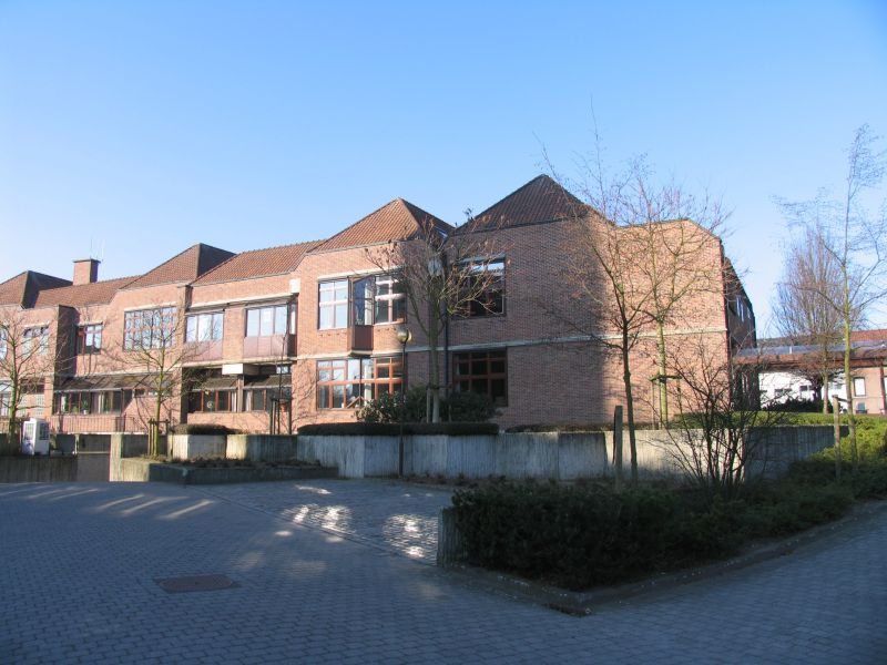 Gemeentehuis van Zemst, foto Marc Alcide, genomen 29-1-2006 rond de middag, kijkrichting noordoost